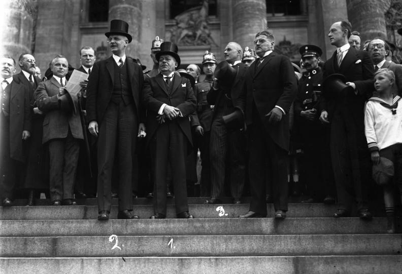 Die Verfassungsfeier in Berlin am 11. August 1923. Reichspräsident Ebert (1), Reichskanzler Cuno (2) und Reichswehrminister Gessler (3) nehmen auf der Freitreppe des Reichstages die Parade der Reichswehr ab.